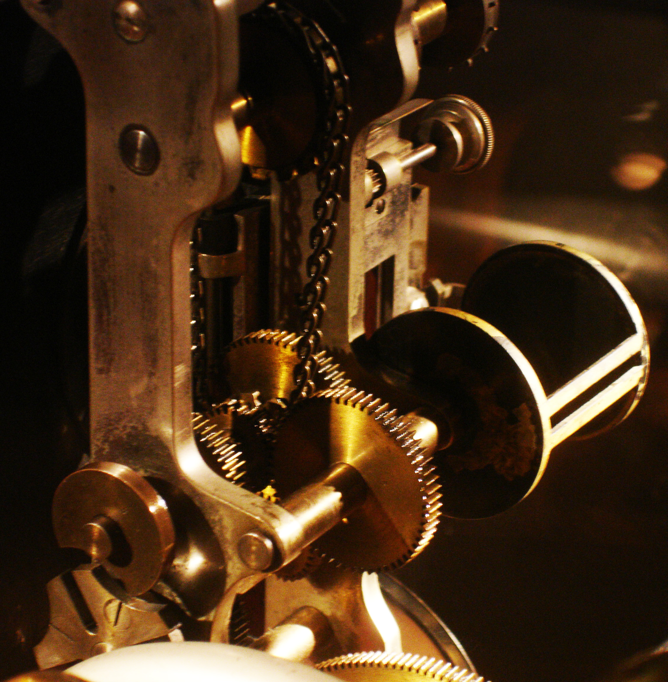 Équipant un appareil de projection cinématographique du début du XXème siècle, cet obturateur cylindrique sert à cacher le court instant où la pellicule se déplace d'un photogramme au suivant, et permet en plus sa ventilation poussée lorsqu'elle passe dans le faisceau très chaud de la lampe à arc.